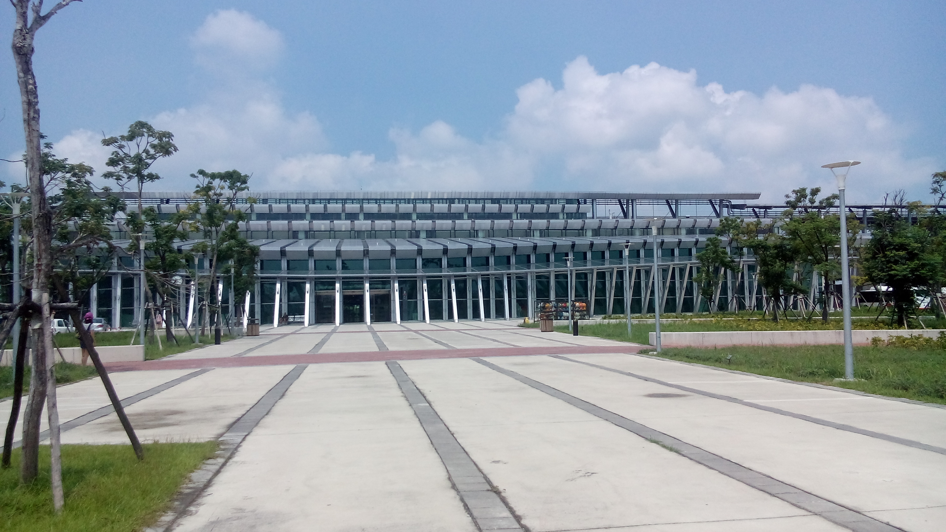 中文（台灣）: 台灣高鐵雲林車站